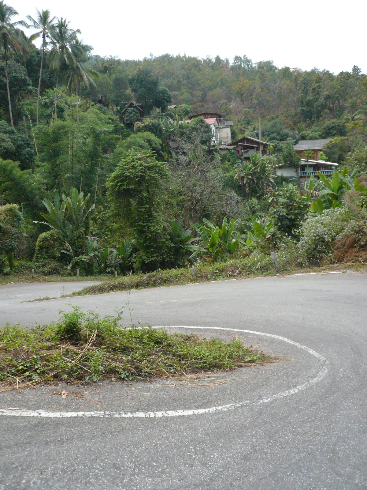 Doi Khun Tan, Thailand